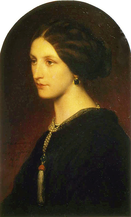 Шувалова Софья Львовна (1829-1894), дочь Л.А. Нарышкина и О.С.Потоцкой